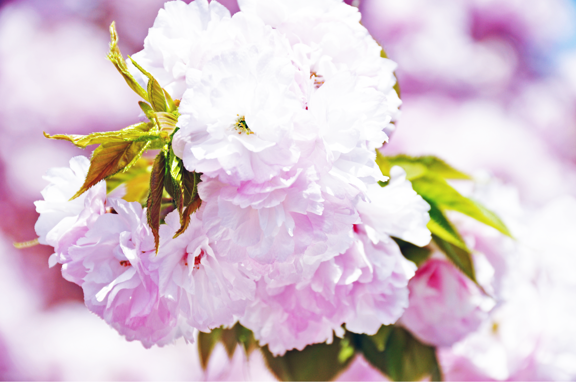 商店街イメージフラワー